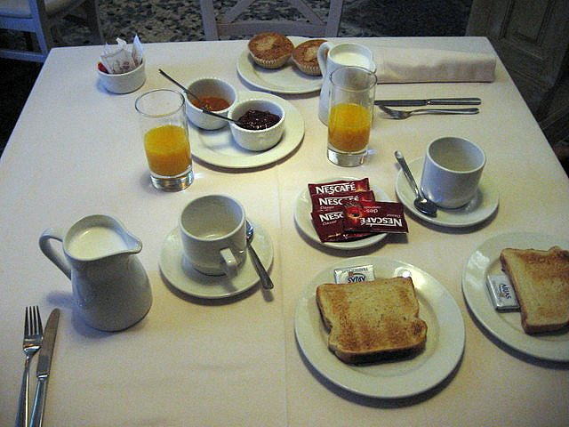 Desayuno en una posada en Candelario (Salamanca, España), con tostadas, mantequilla, zumo de naranja, leche, café soluble y magdalenas.